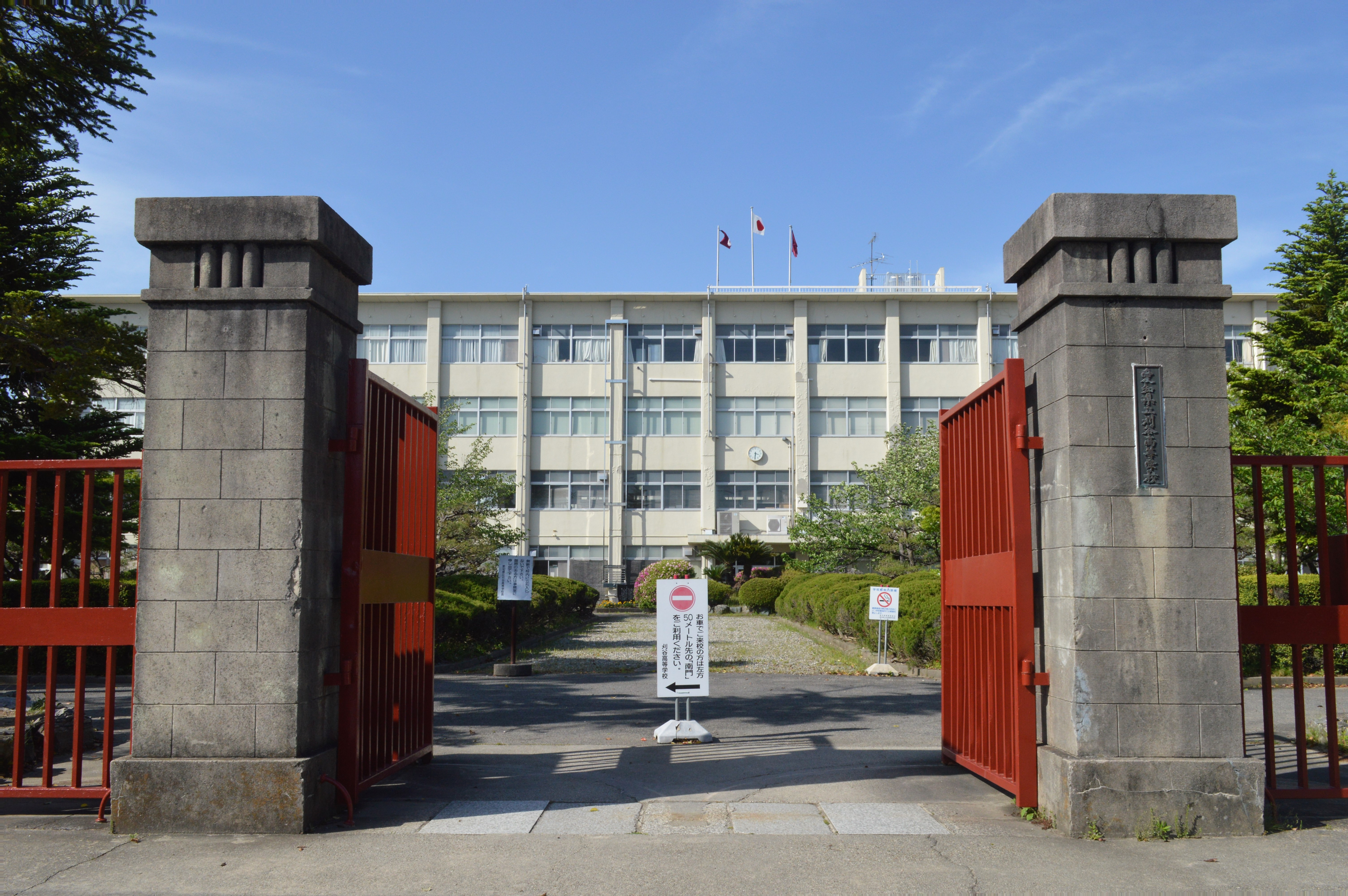 愛知県刈谷市にある愛知県立刈谷高等学校（愛知県立刈谷高校）。正門門柱は登録有形文化財。